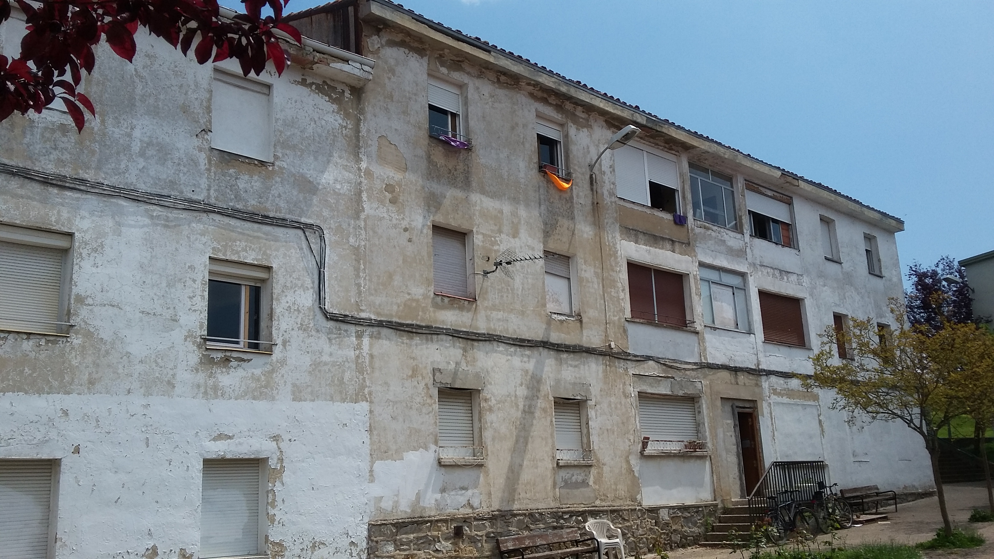 Barrio de Errekaleor, Vitoria-Gasteiz, Álava, País Vasco (España). Bloque de viviendas.